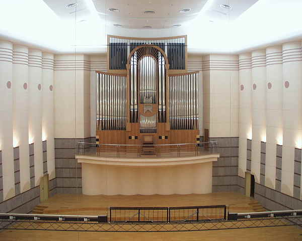 Oberlinger-Orgel im Konzertorgel des großen Sende- und Konzertsaales von CNR (China National Radio, Peking/China )